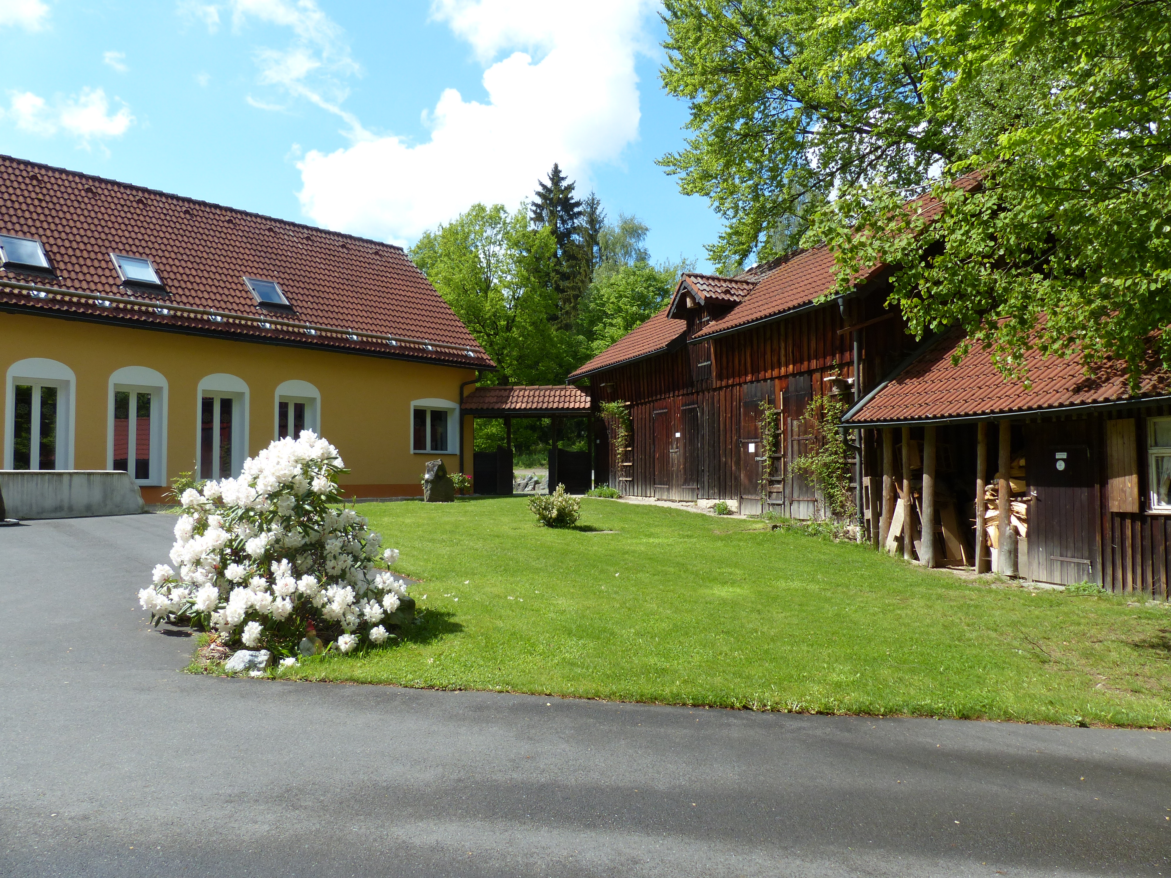 Waldkloster Muttodaya, Ortsteil Herrnschrot, Stammbach